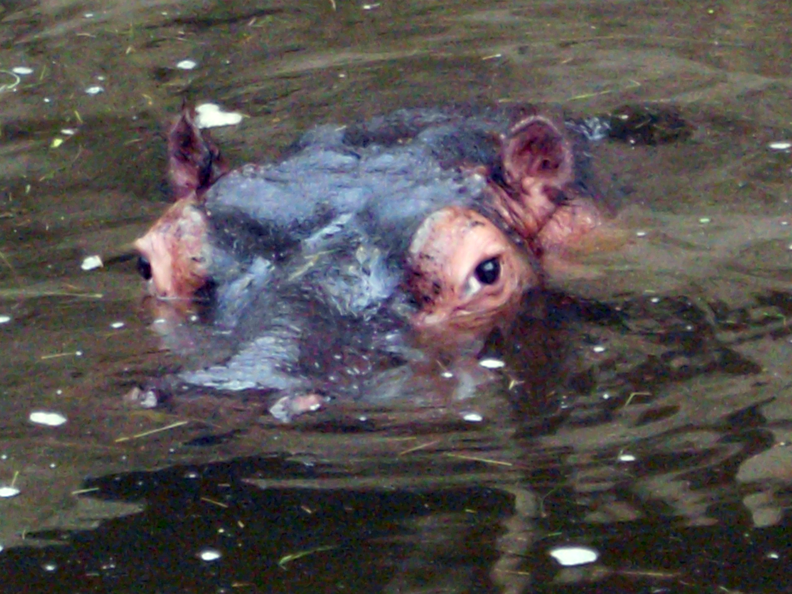 Hippopotamus amphibius, ZOOM Erlebniswelt Gelsenkirchen